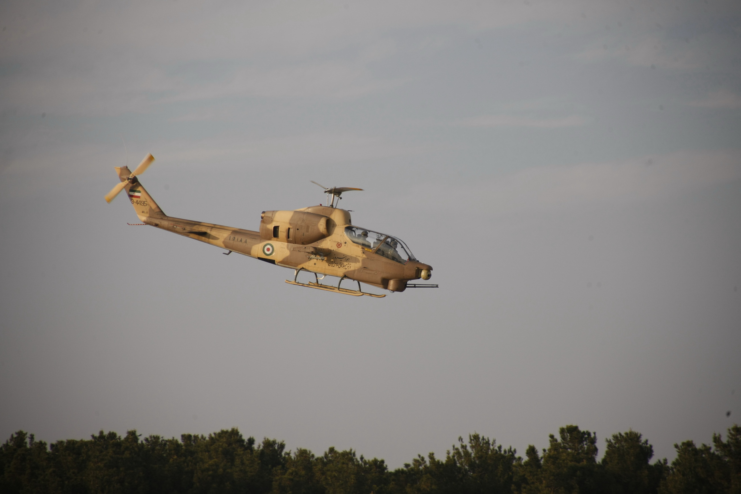 نمای سمت راست بالگرد توفان 2 متعلق به هوانیروز ارتش جمهوری اسلامی ایران